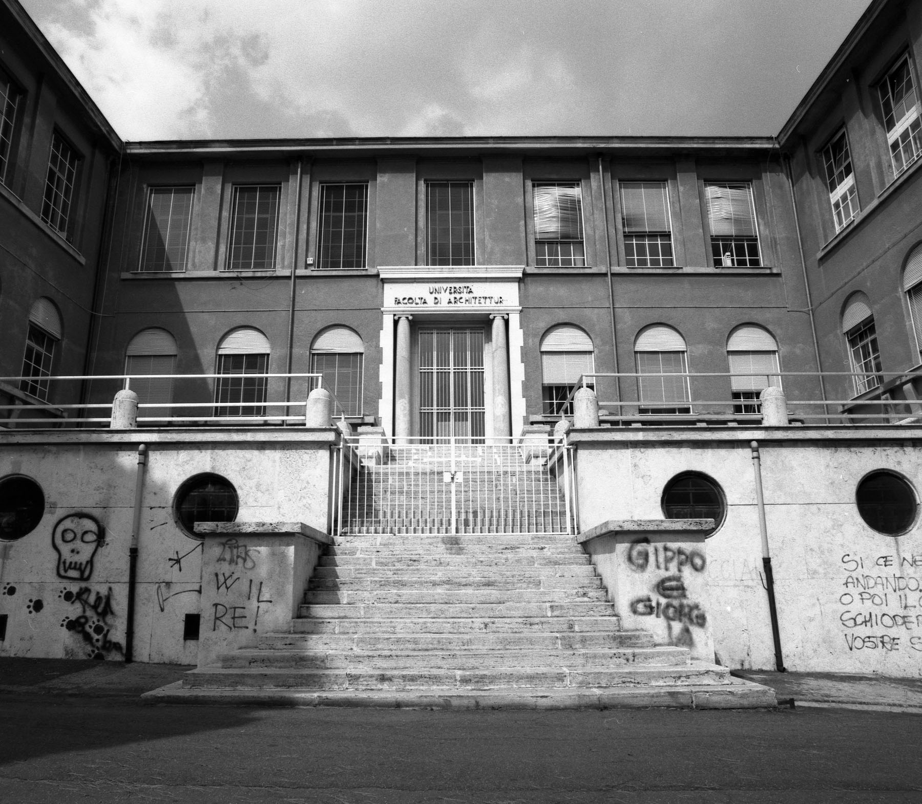 Facoltà di Archiettura Roma via Gramsci